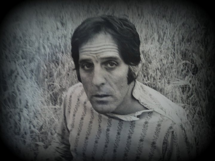 Foto di José Garcìa Ortega